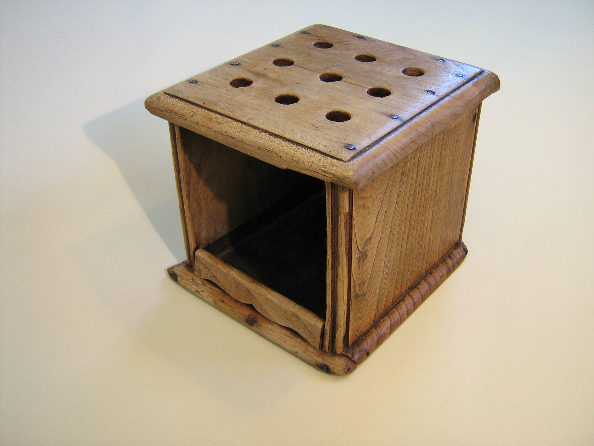 Heater for feet. Age unknown, it looked this old already 70 years ago. (NL: Voetenstoof. De voetenstoof is antiek. Hoe oud de stoof is, is onbekend. Hij zag er 70 jaar geleden al net zo oud uit).